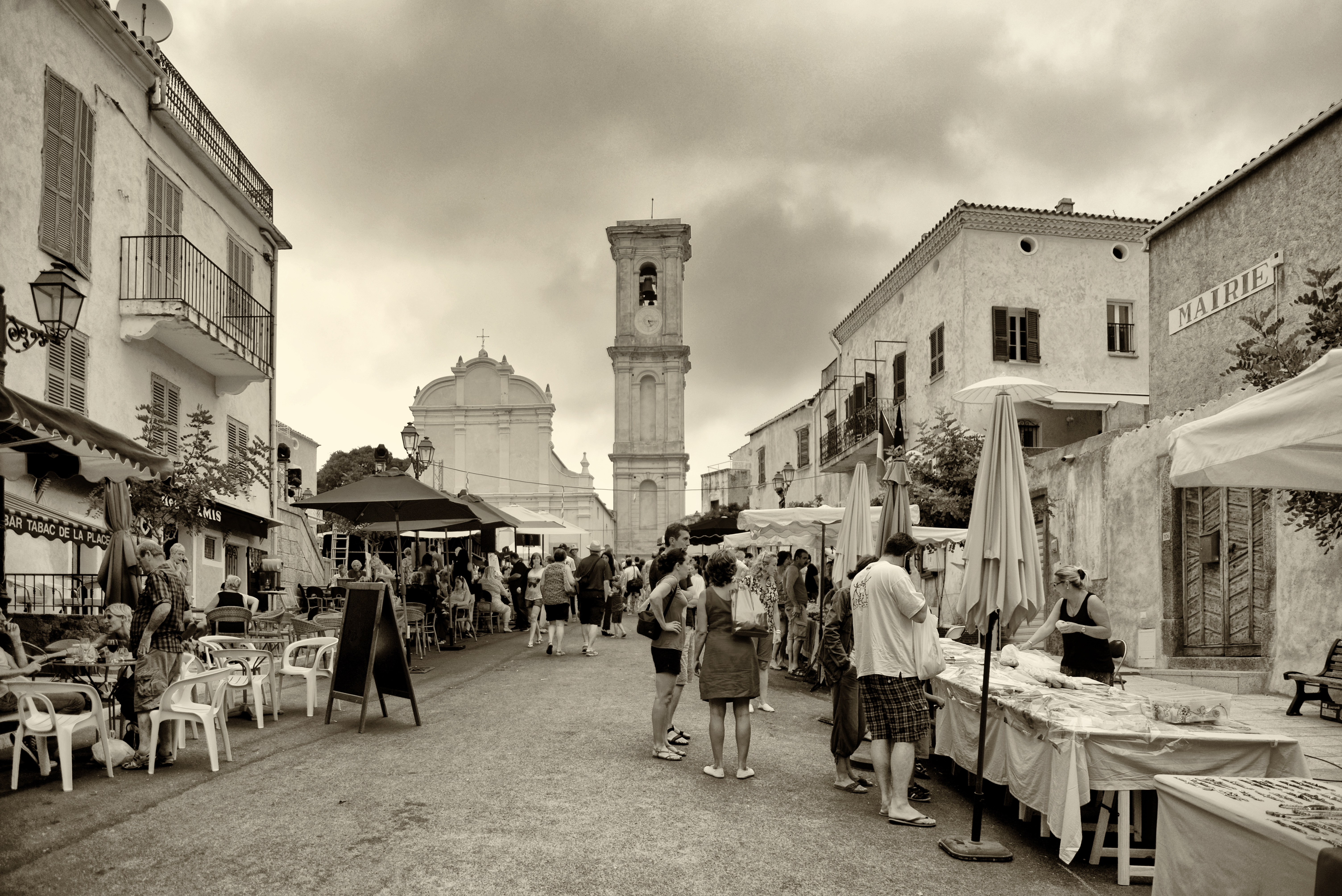 Aregno, Balagne (Corse) - Foire de l'Amandier 2014, place de l'église